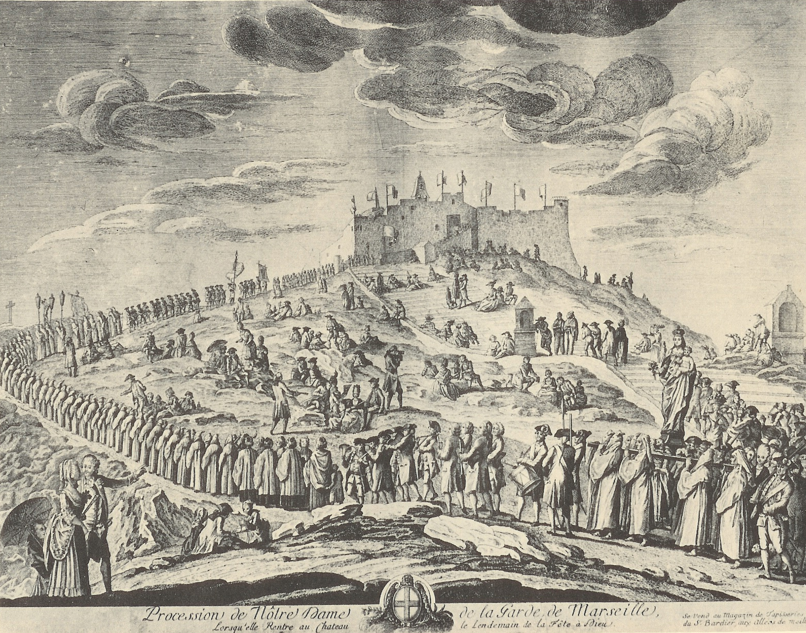 Gravure de 57x67cm - Musée du Vieux-Marseille Procession de Notre-Dame de la Garde de Marseille, le lendemain de la fête Dieu - .